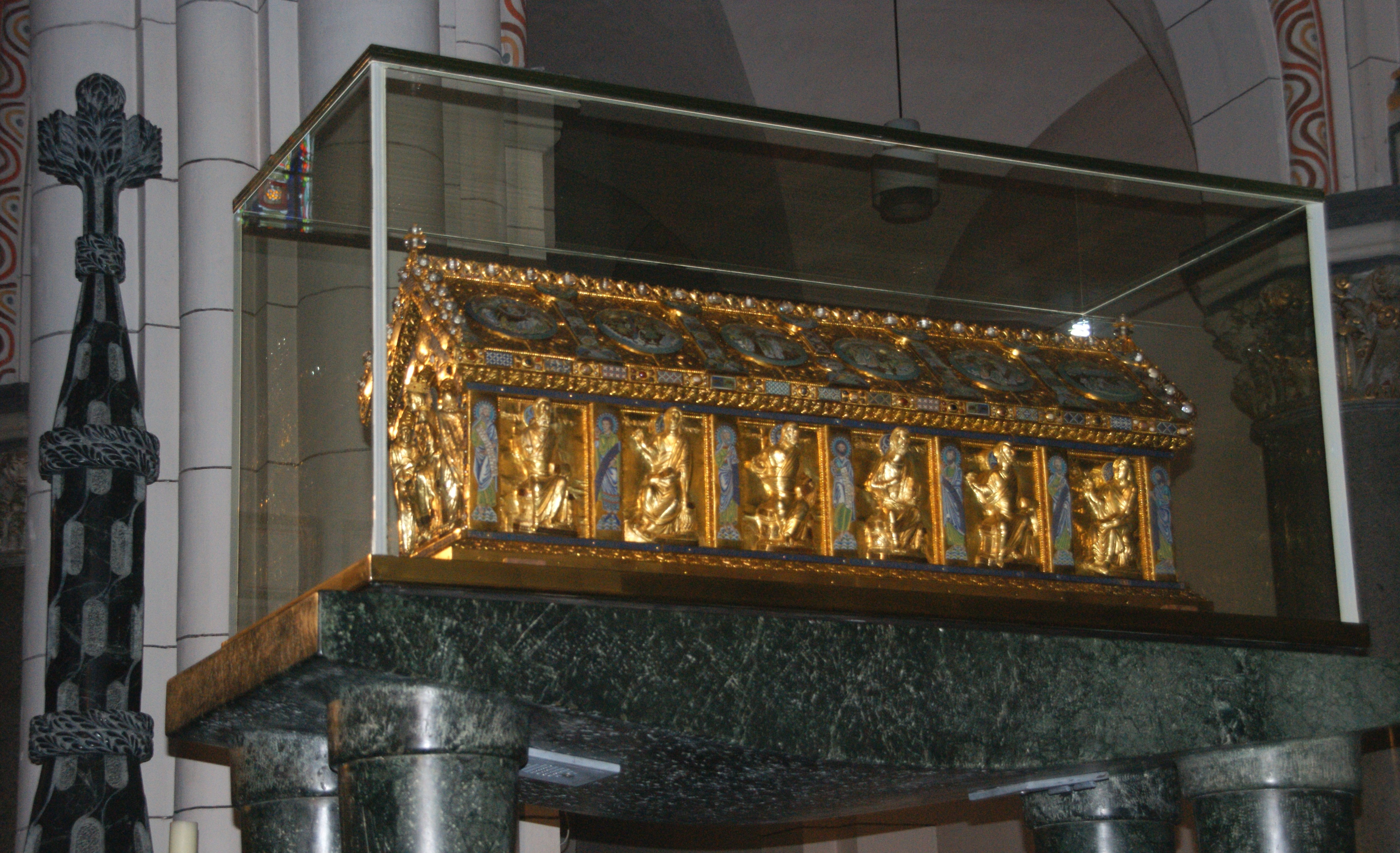 Heribert von Köln, Schrein in Neu St. Heribert in Köln-Deutz